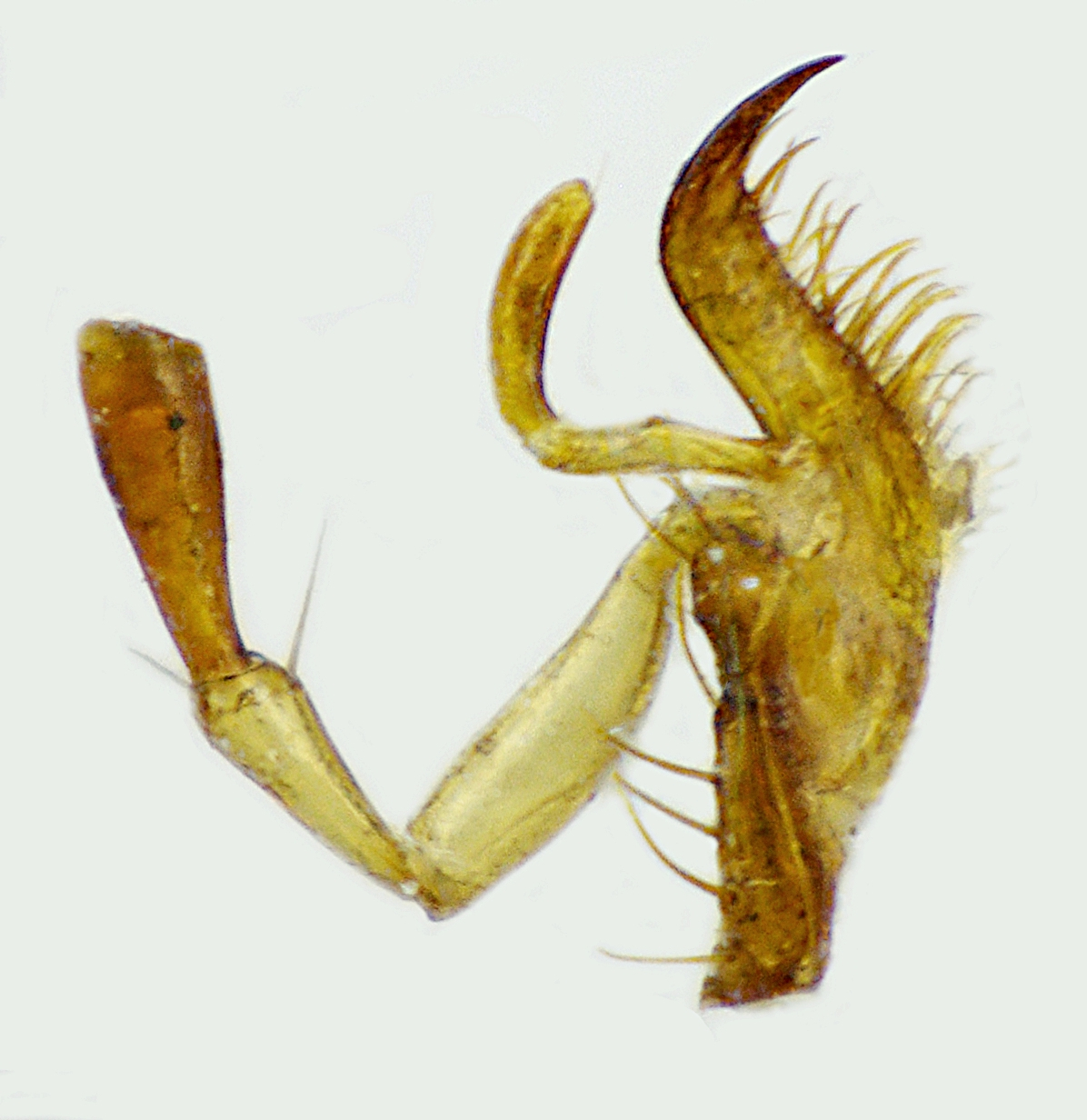 Nebria livida Unterkiefer mit erstem und zweiten Kiefertaster